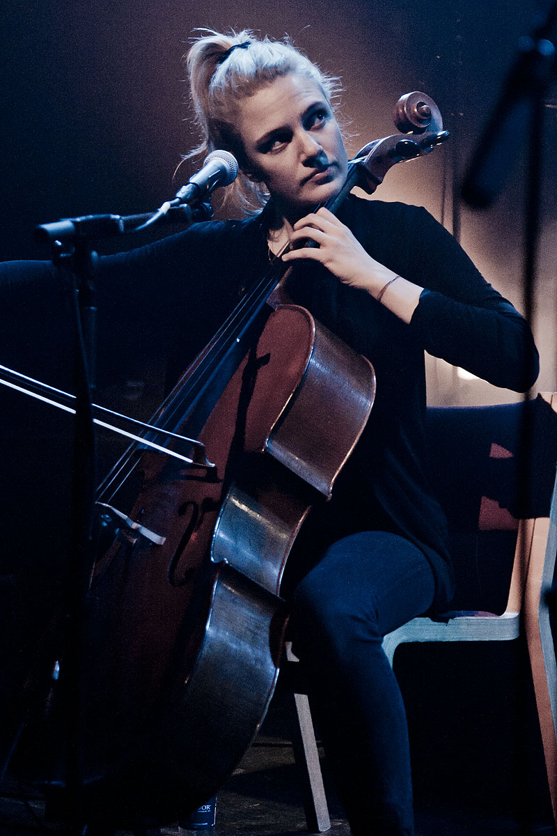 Cæcilie Trier ved en koncert med Choir of Young Believers på spillestedet Forbrændingen den 5. april 2012